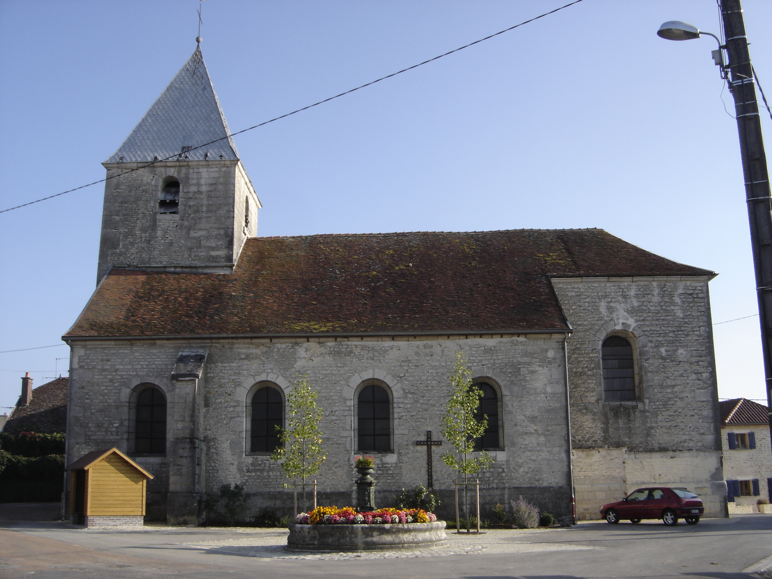 Eglise d'Arconville (Aube, Champagne, France)